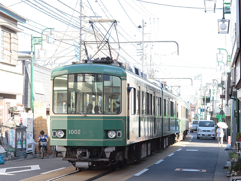 江ノ島電鉄1000形1002編成。リニューアル工事に伴い塗装も同社20形と同様のものへと改められた。腰越-江ノ島間・2005年9月14日撮影